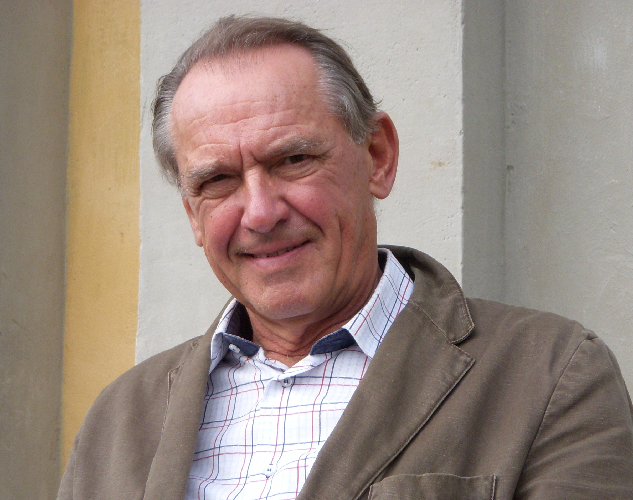 Jan Eliasson fotograferad i parken på Ulriksdals slott